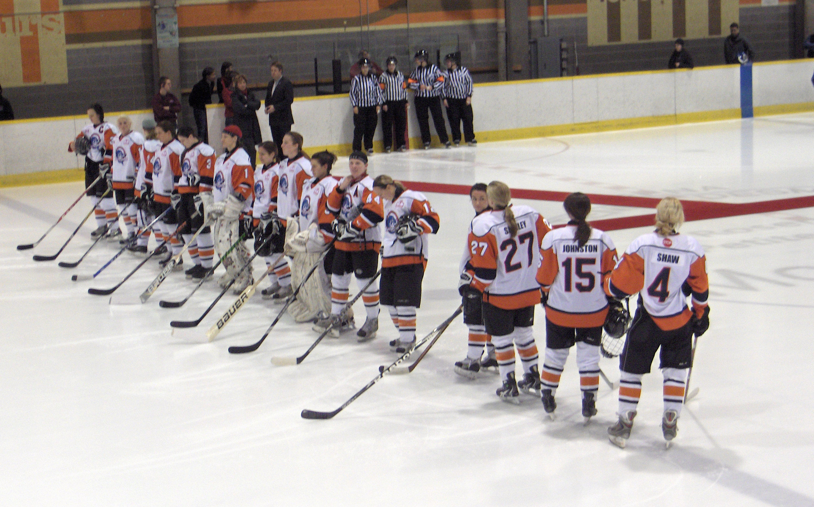 Présentation d'avant-match des joueuses du Burlington